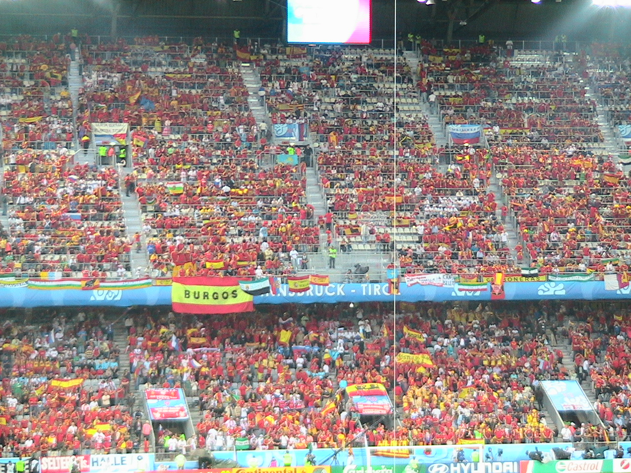 Испанские болельщики на матче Испания - Россия 10 июня 2008 года